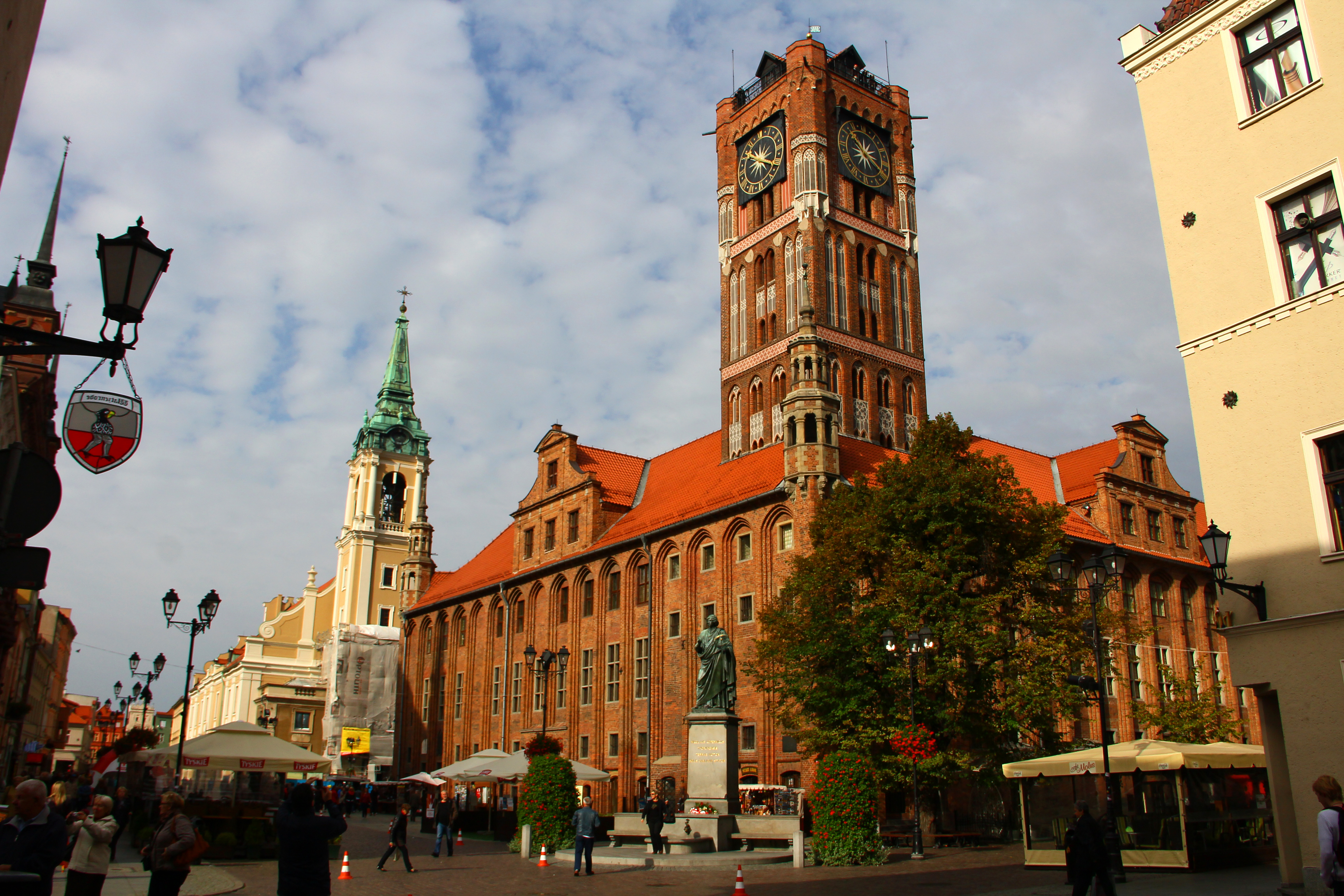 Toruń. Ratusz, pomnik M. Kopernika, kościół Akademicki.